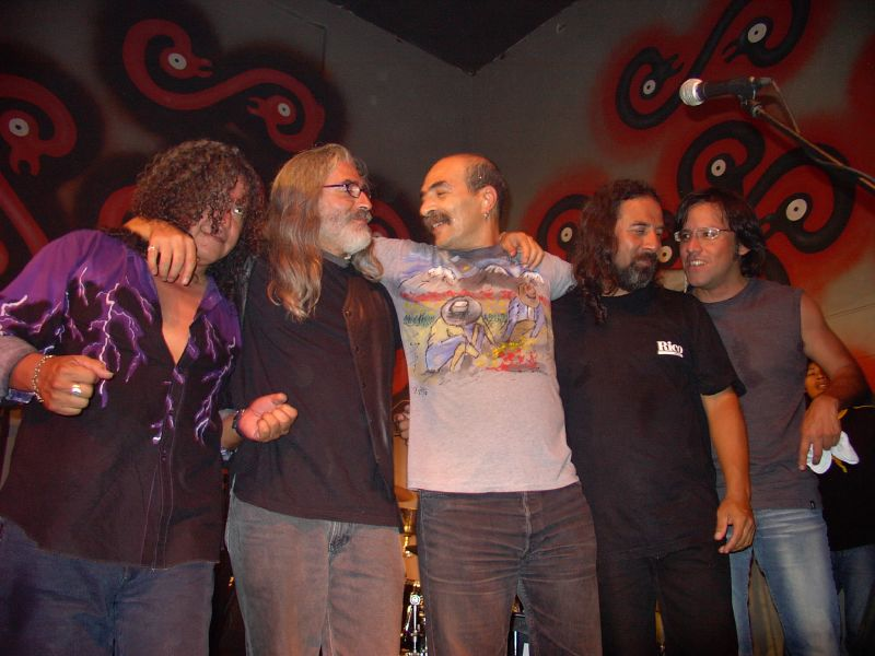 Rock peruvian band, Músicos de Frágil